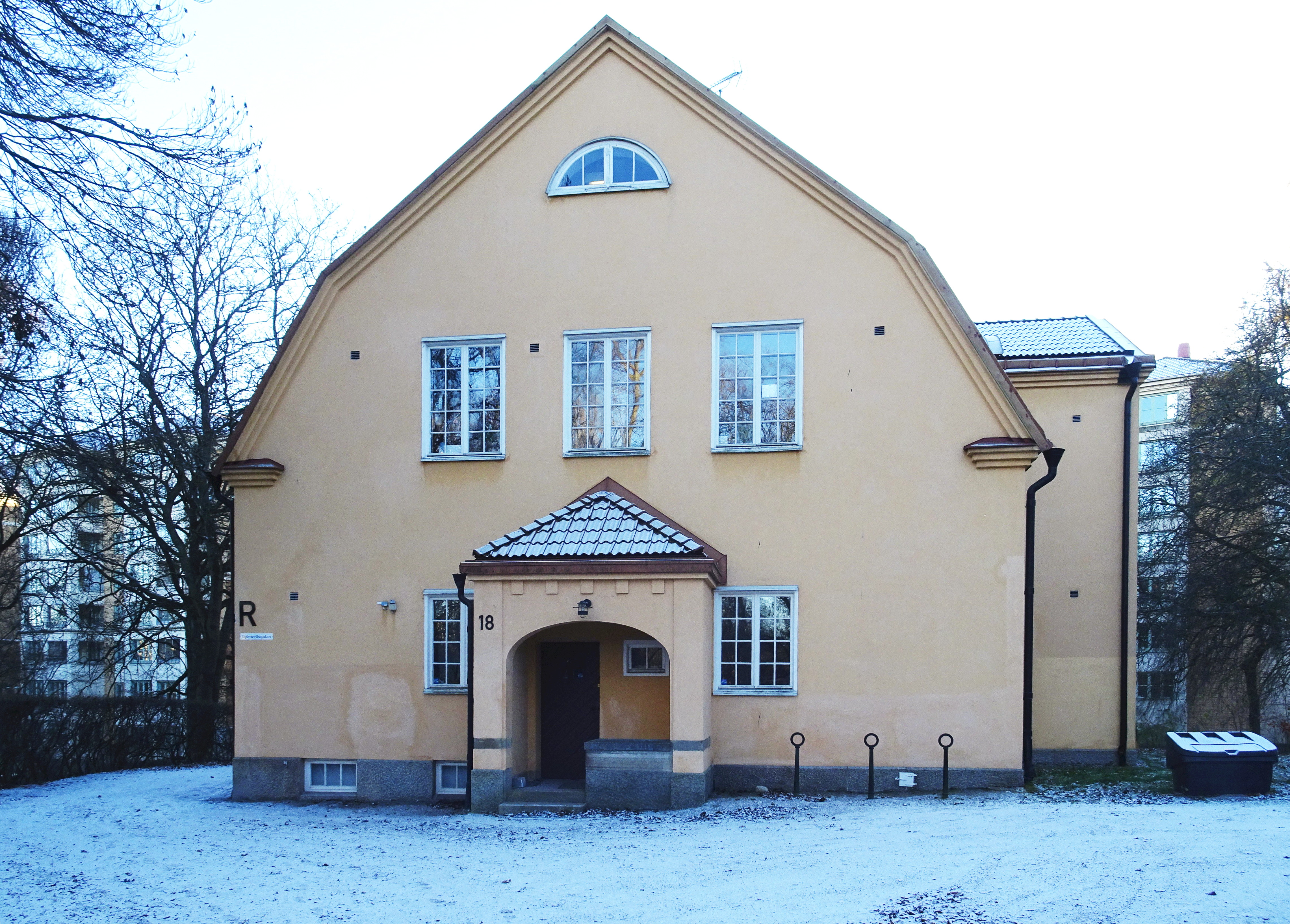 Reggio Emilia Institutet på Campus Konradsberg, ursprungligen Intendentvilla för Konradsberg, arkitekt Ture Stenberg (1914)